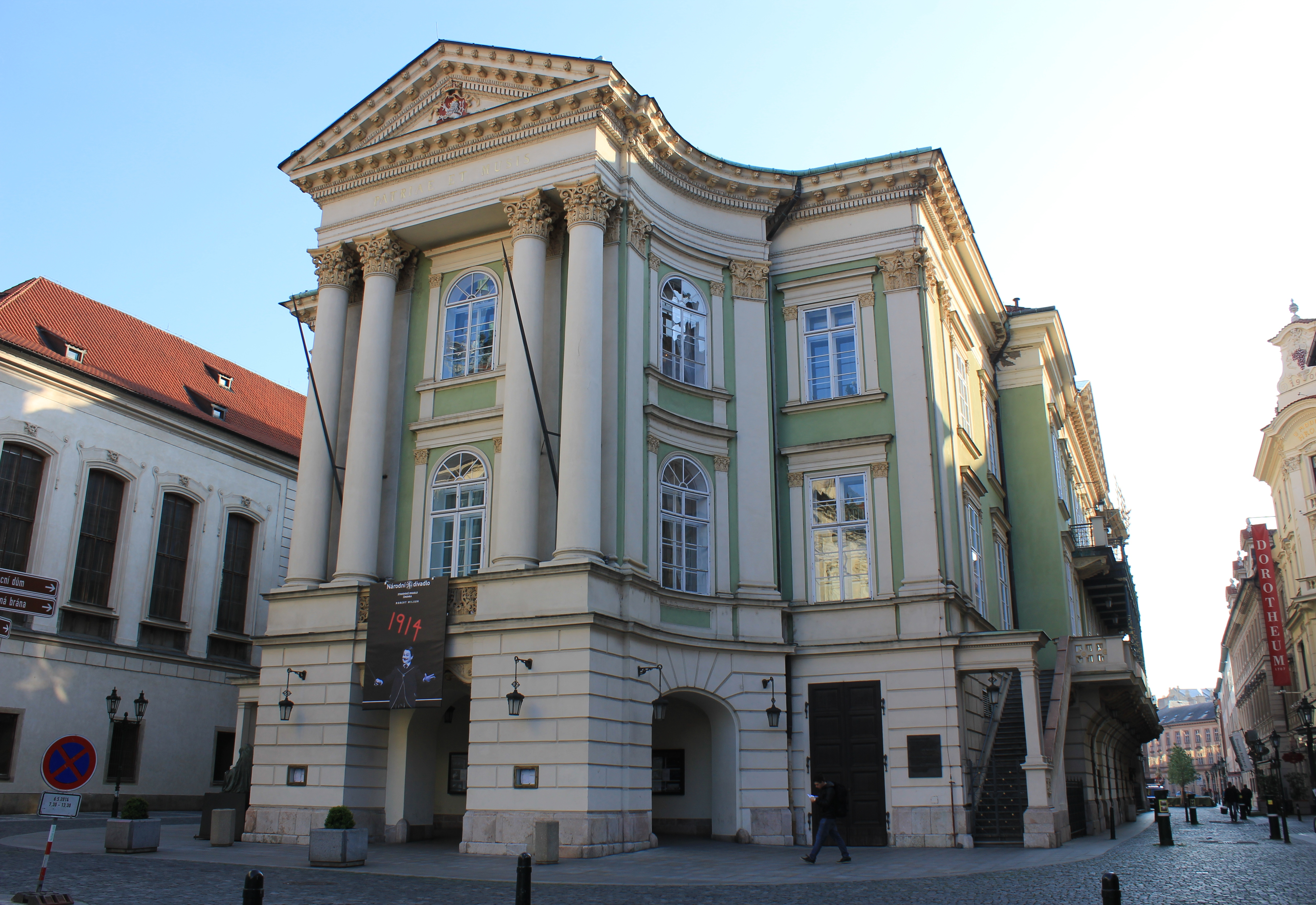 Staovske - teateret